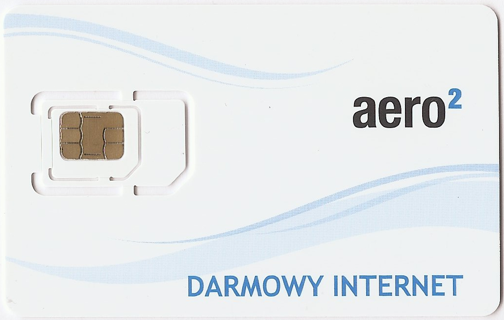 Karta sim bezpłatnego dostępu do internetu aero2 front